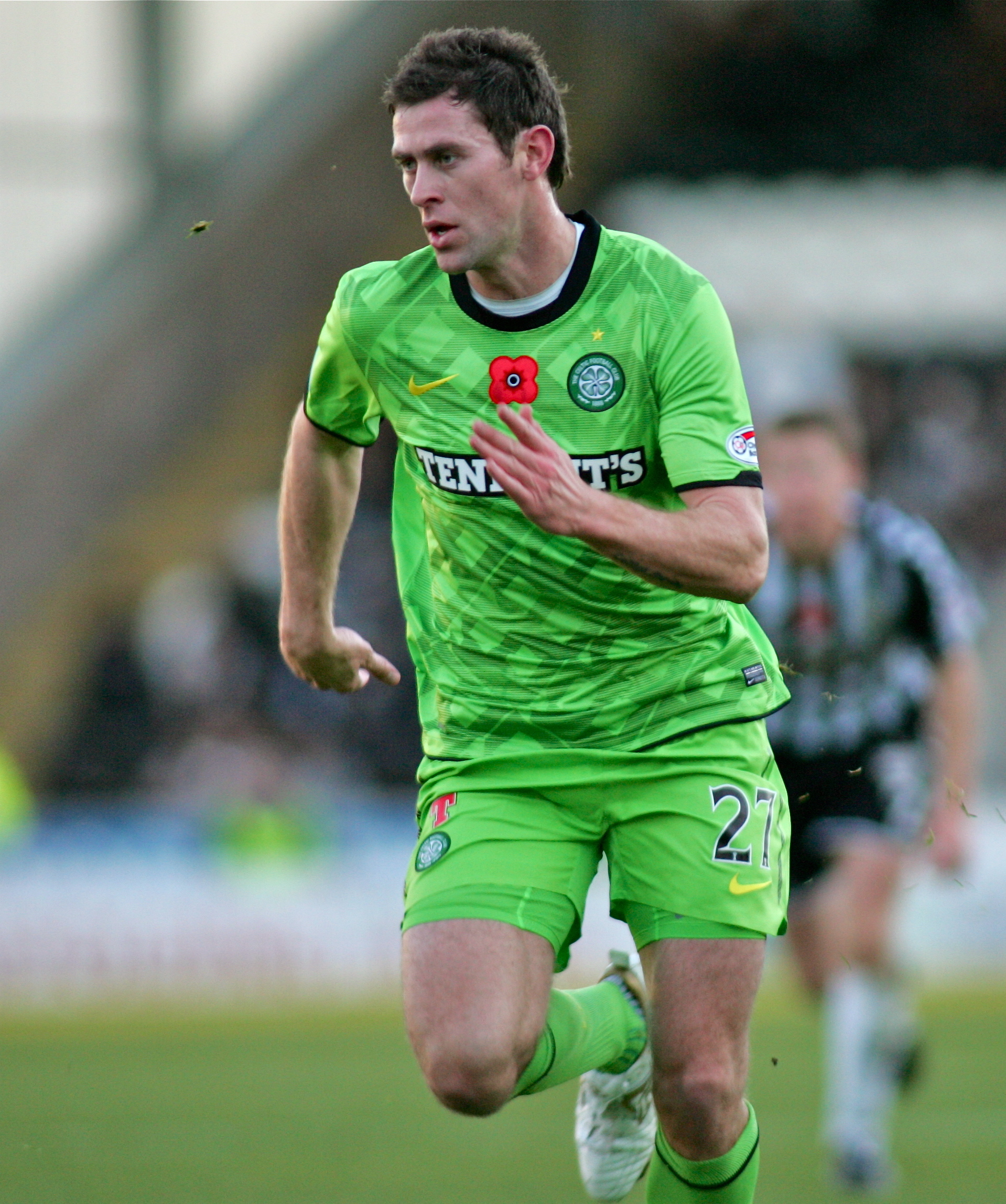 HI7Y0330